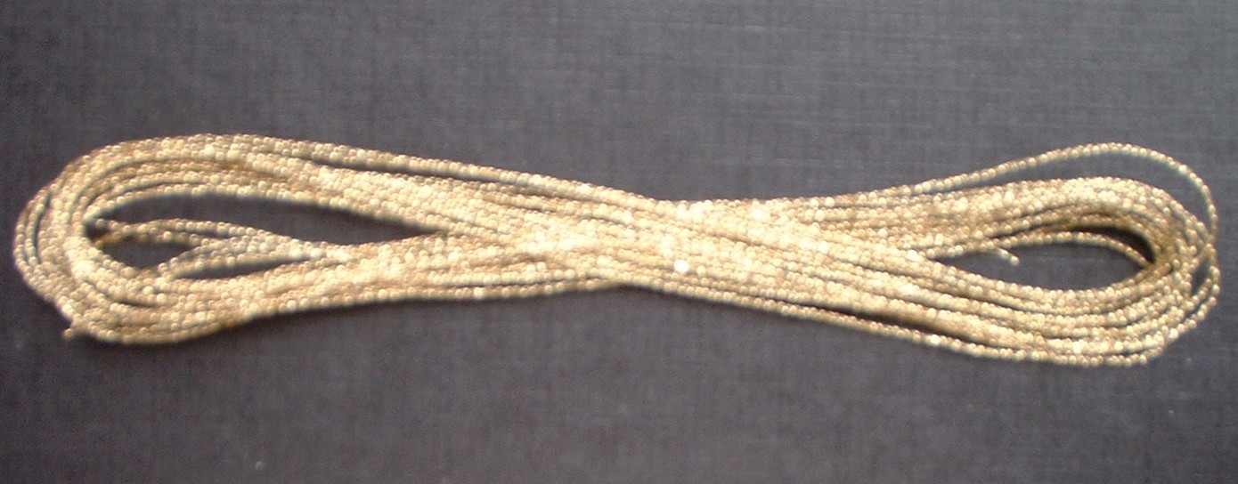 Effektgarn: Polyester metallisiert; Lurex